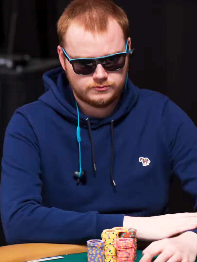 Conor Beresford bei der World Series of Poker 2018